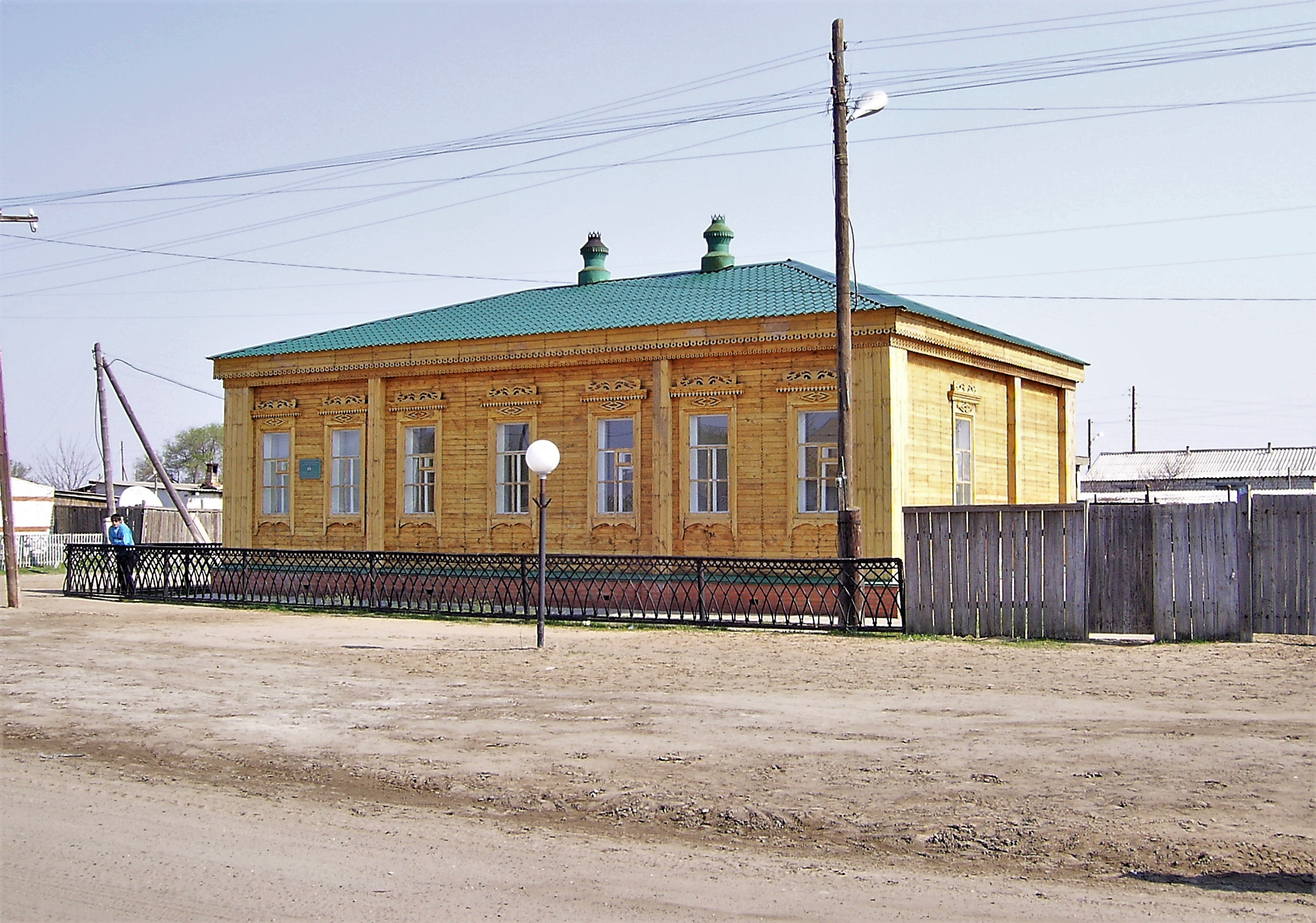 One of the first schools in Bukeevskaja Orda, Kazakhstan